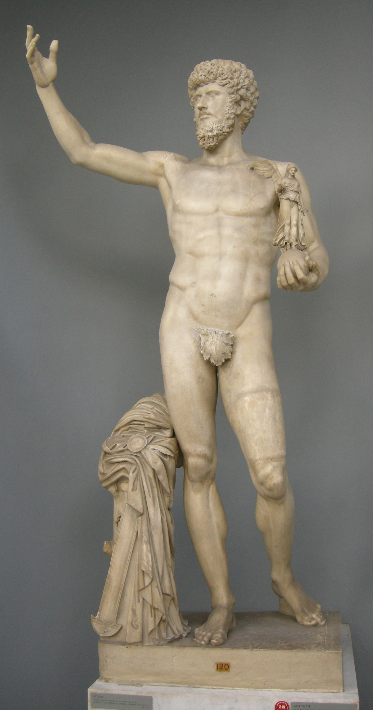 Atleta, con testa non pertinente di lucio vero, corpo da mirone (460-450 ac.), inv. 2217